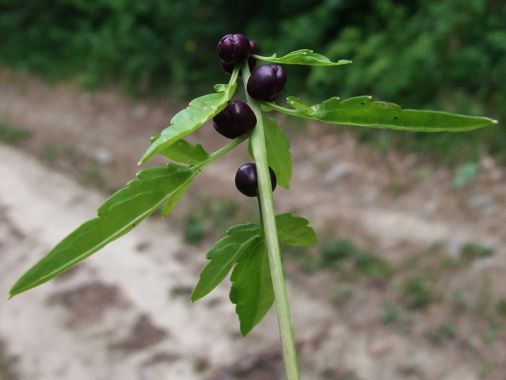 Cardamine bulbifera